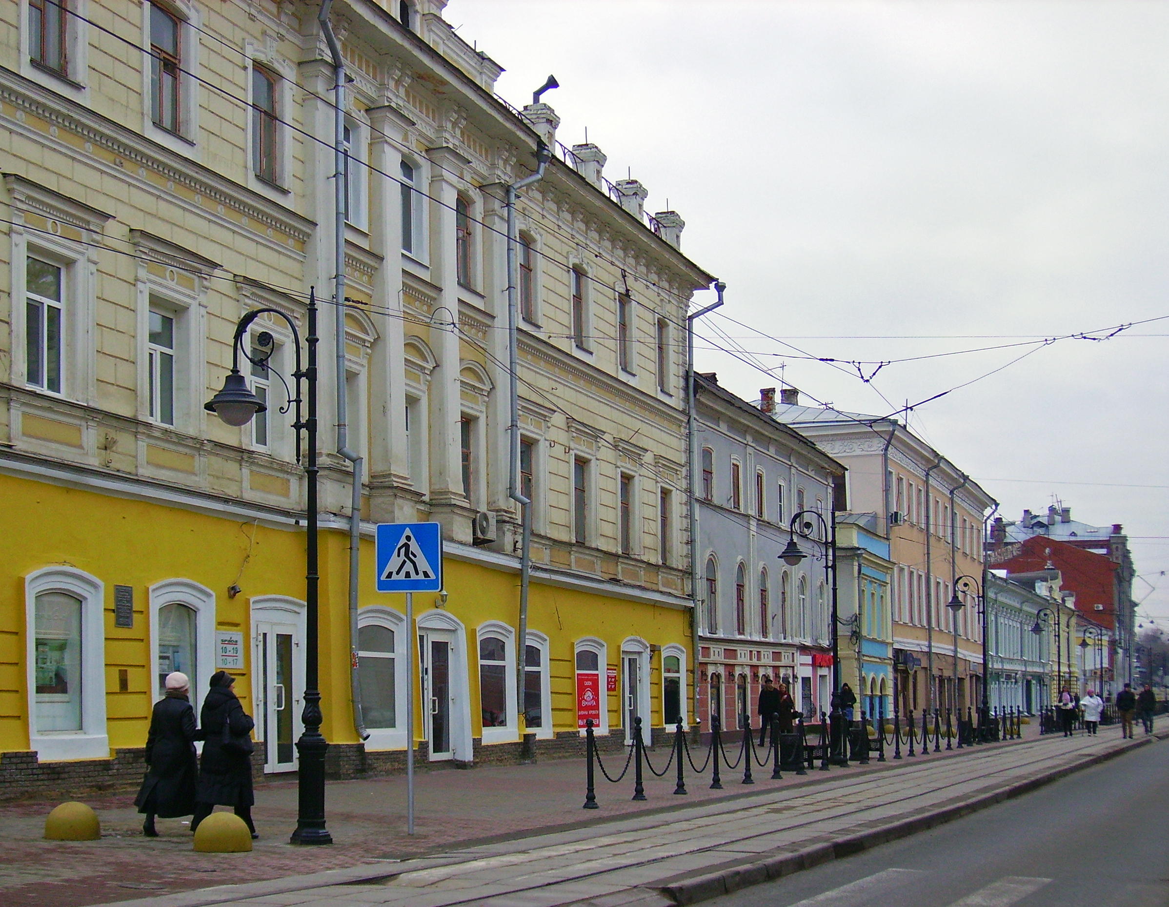 Доходный дом (Нижегородская область, Нижний Новгород, улица Рождественская, 12)